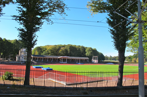 Slottsskogsvallen i Göteborg 2013.